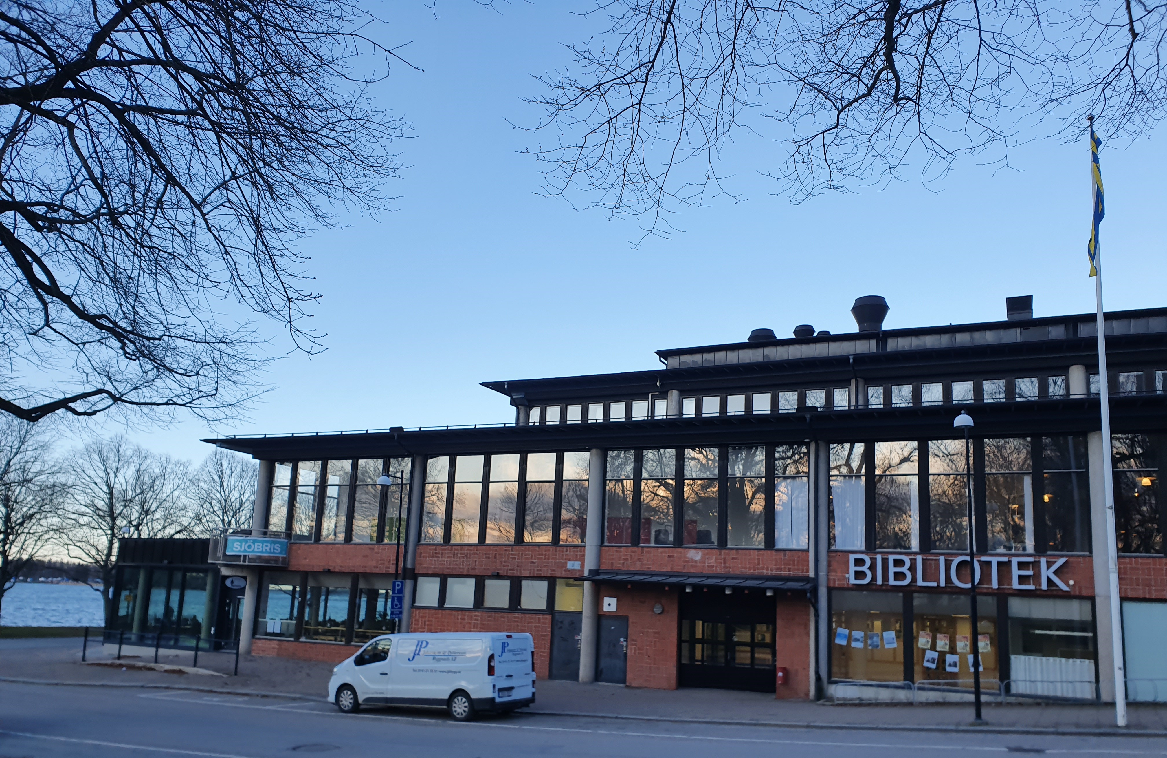 Folket Hus i centralal Motala som innehåller bibliotek, teater, kulturskola och restaurang